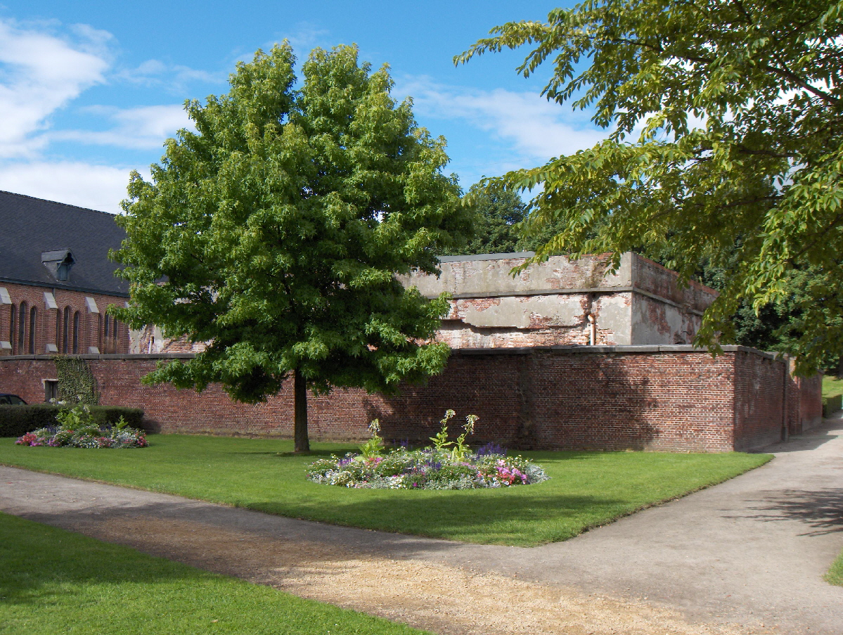 Bild: Lillo (Belgien), Pulverturm Fotograf: Friedrich Tellberg Bild: 7. August 2005